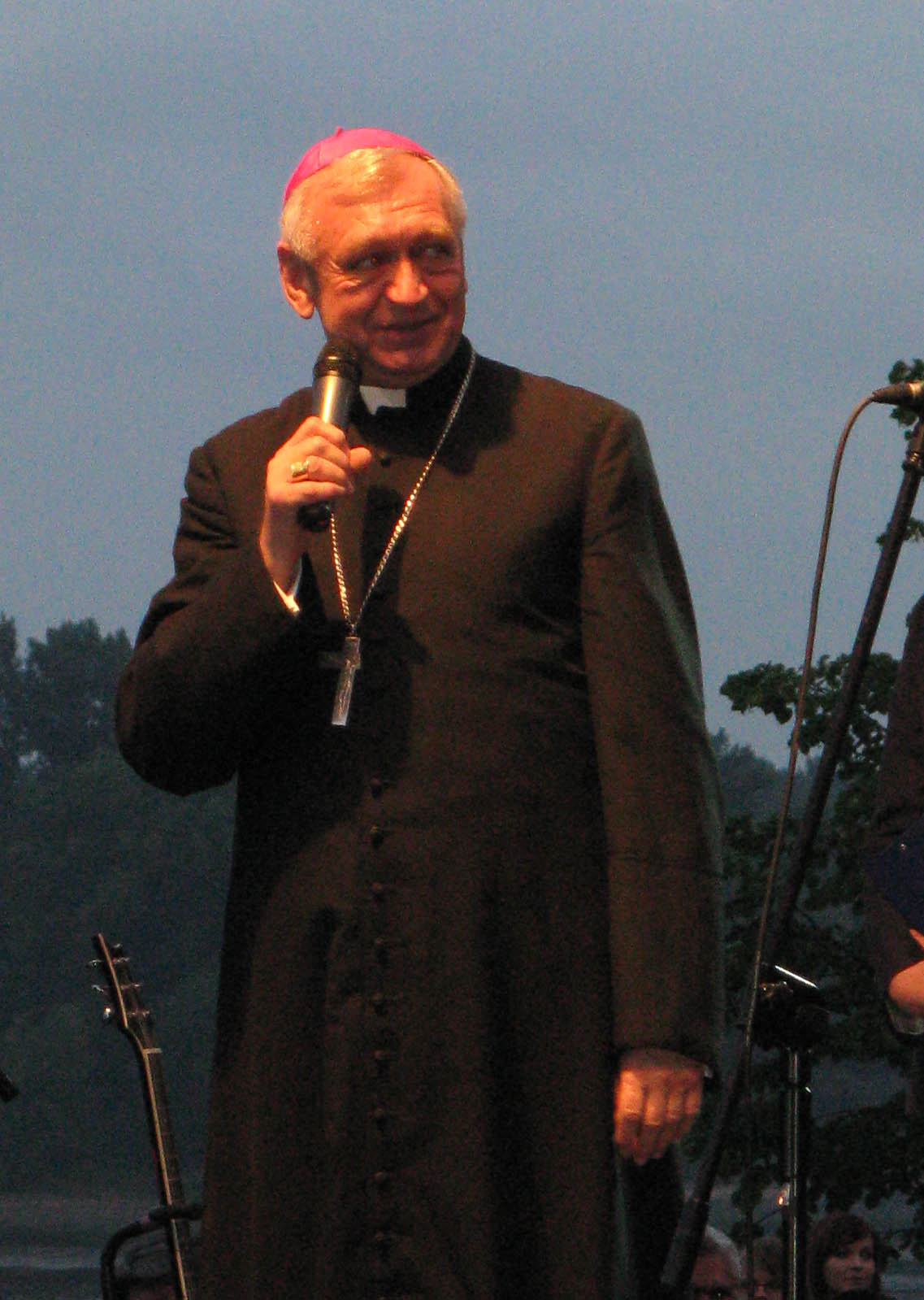 Biskup diecezji toruńskiej Andrzej Suski na festiwalu Song of Songs 2008